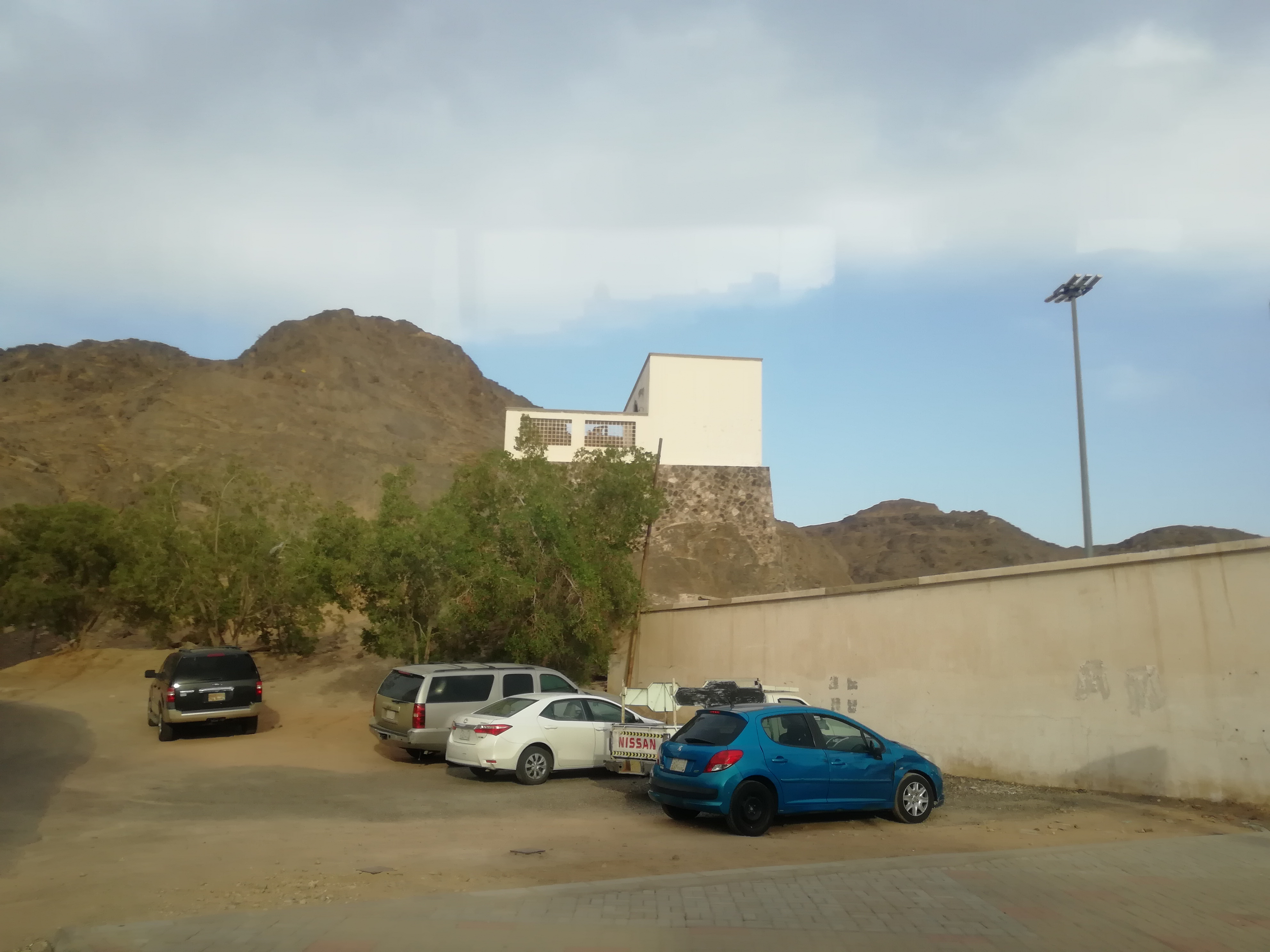 al-Madinah al-Munawarah Salaa mountain Seven mosques area al-Fatah mosque